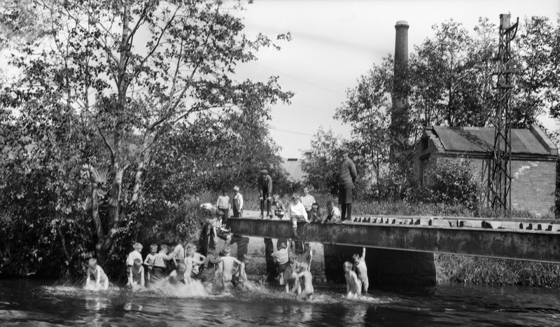 Bildet viser den nå gjenfylte og glemte Håkonsjøen på Bjølsen. Sjøen var en gang en stor kulp i Akerselva med et så rikt badeliv at både busstopp og veinavn like ved heter "Badebakken".